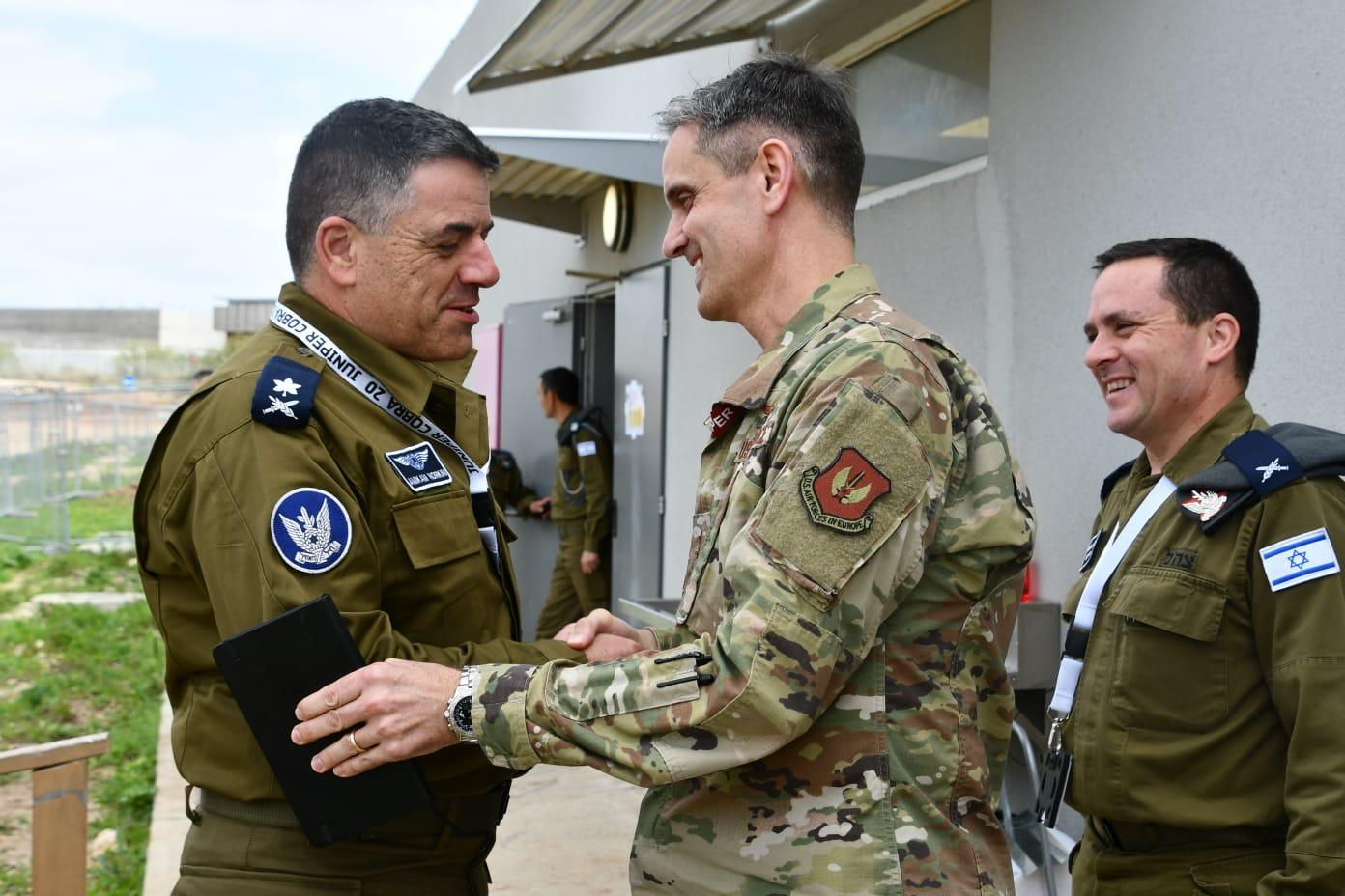 התרגיל המשותף של צה"ל ופיקוד אירופה של צבא ארה"ב.